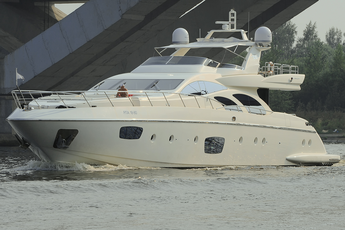 Azimut 98 Leonardo."Enigma".Moscow